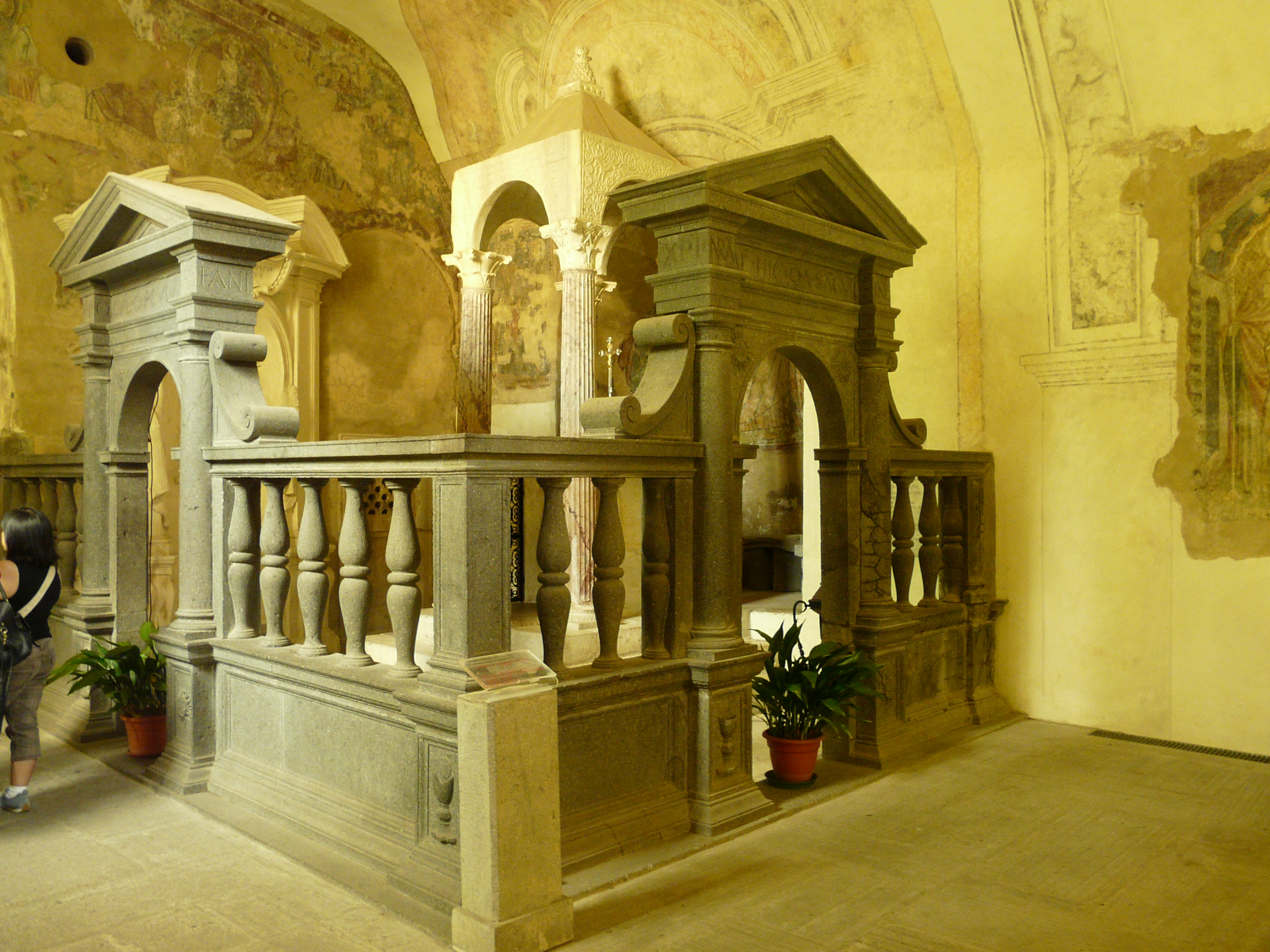 Basilica di Santa Cristina, Bolsena, Lazio, Italia